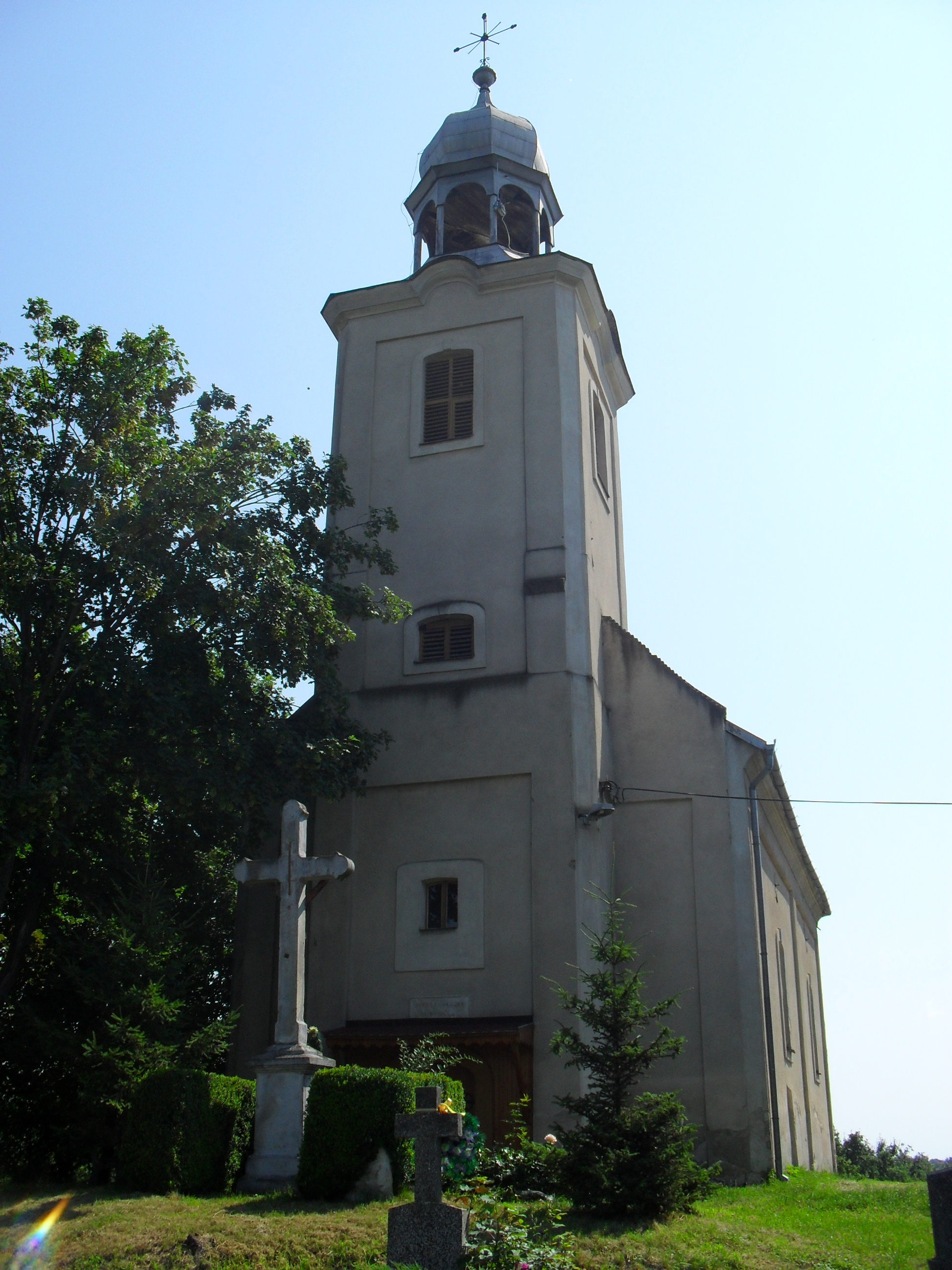 Zemplén - görög katolikus templom